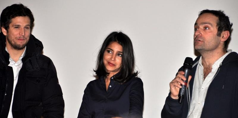 Guillaume Canet, Leïla Bekhti et Cédric Kahn à l'avant-première du film Une vie meilleure